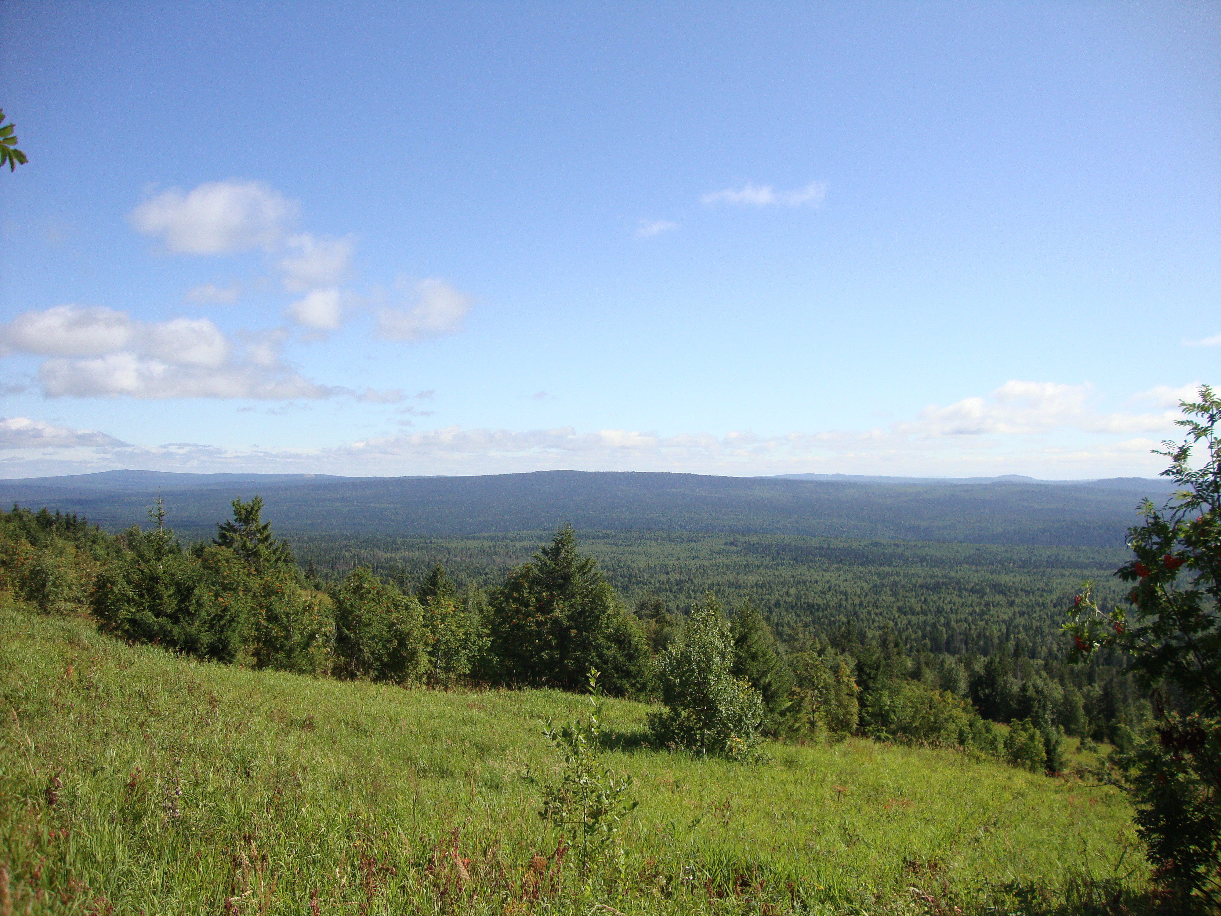 Басеги заповедник, Горнозаводский район This image is related to the protected area of Russia number 5900052